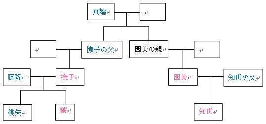 主人公の家系図。言葉だけでは分かりにくいので図を作成。